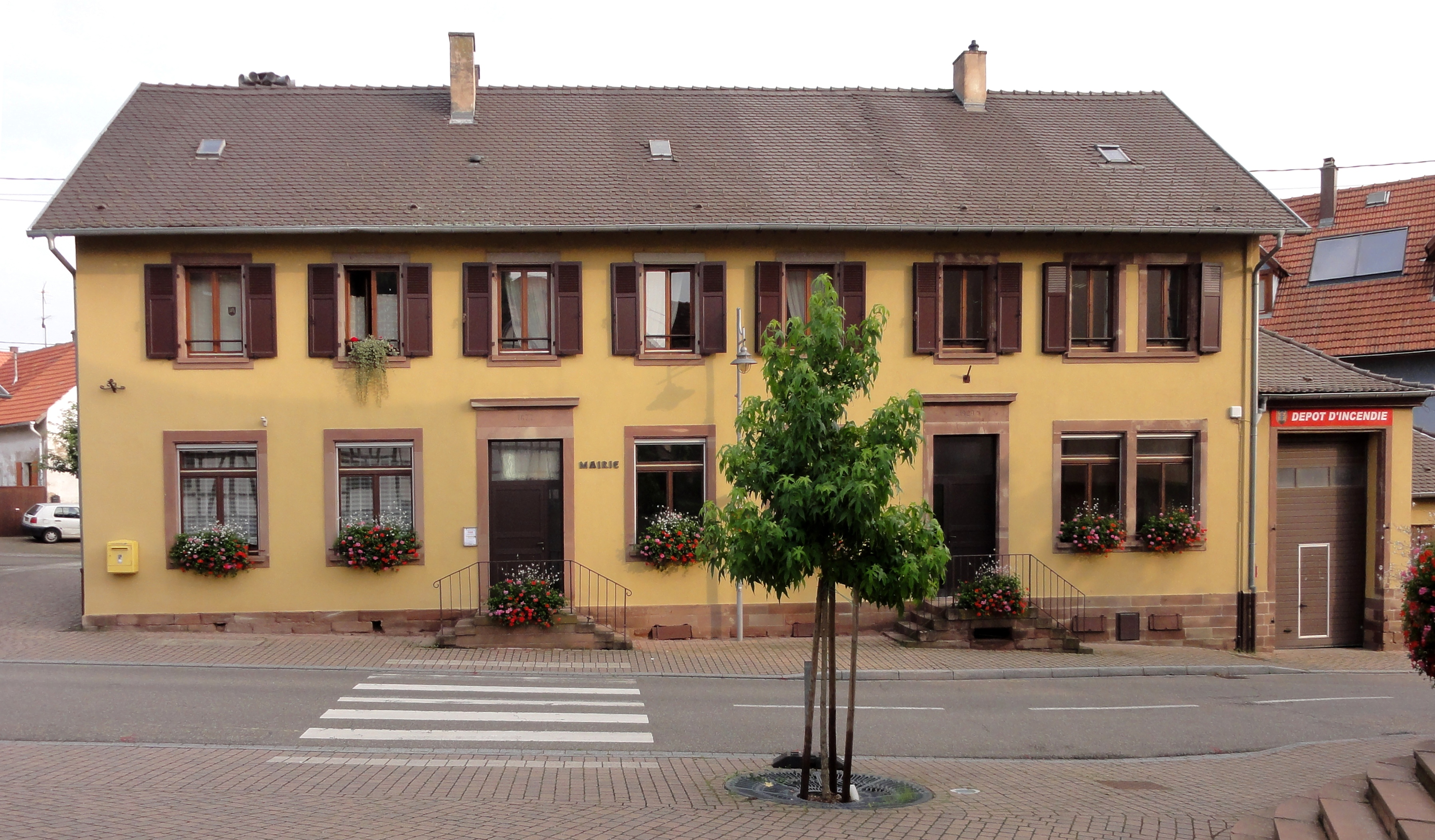 Alsace, Bas-Rhin, Dingsheim, Mairie-école (1877-1926). .